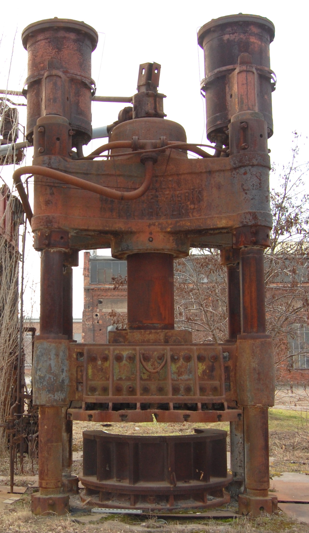 Kümpelpresse auf dem SKL-Gelände in Magdeburg-Salbke